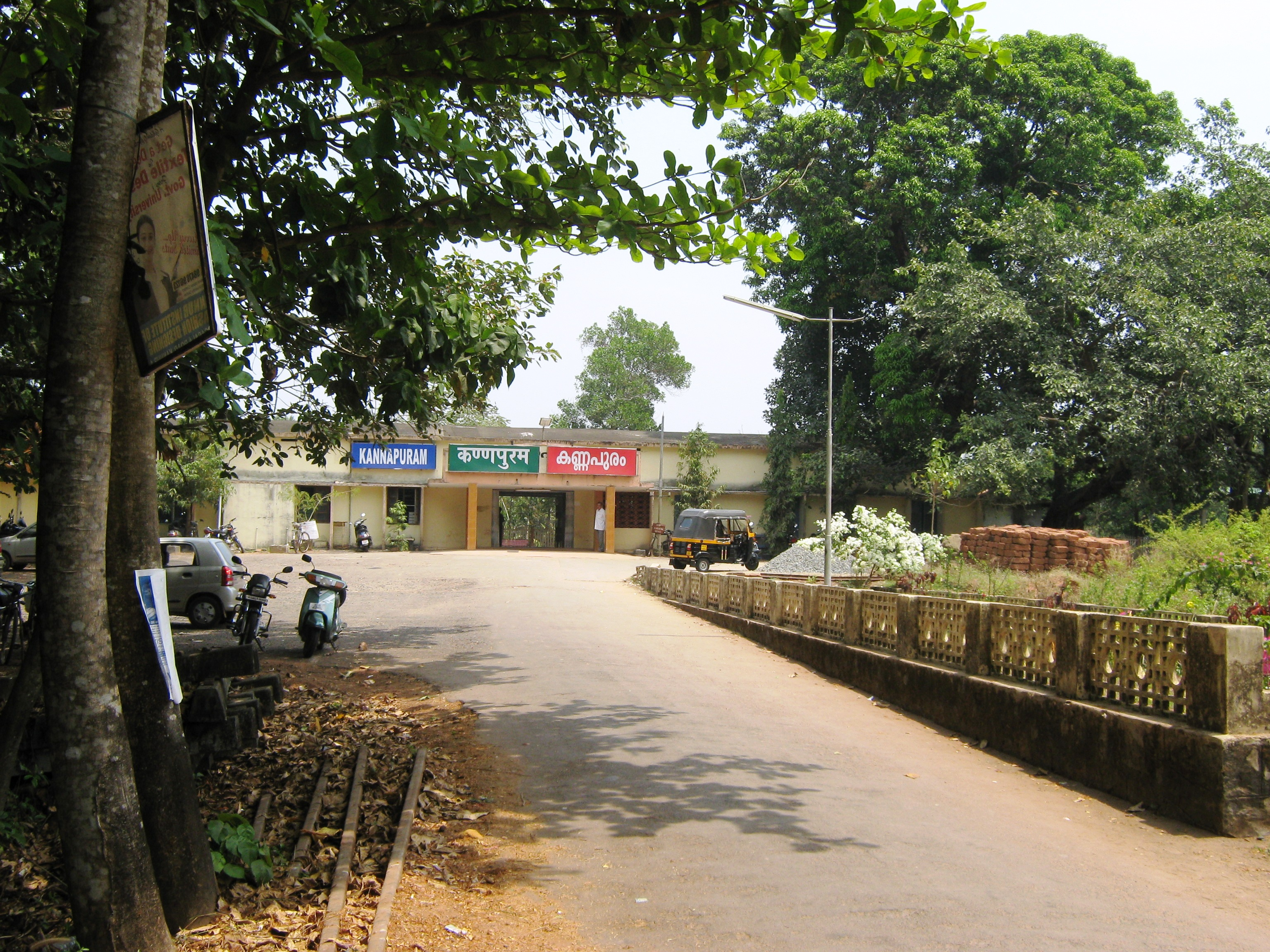 Kannur, Kerala, India.